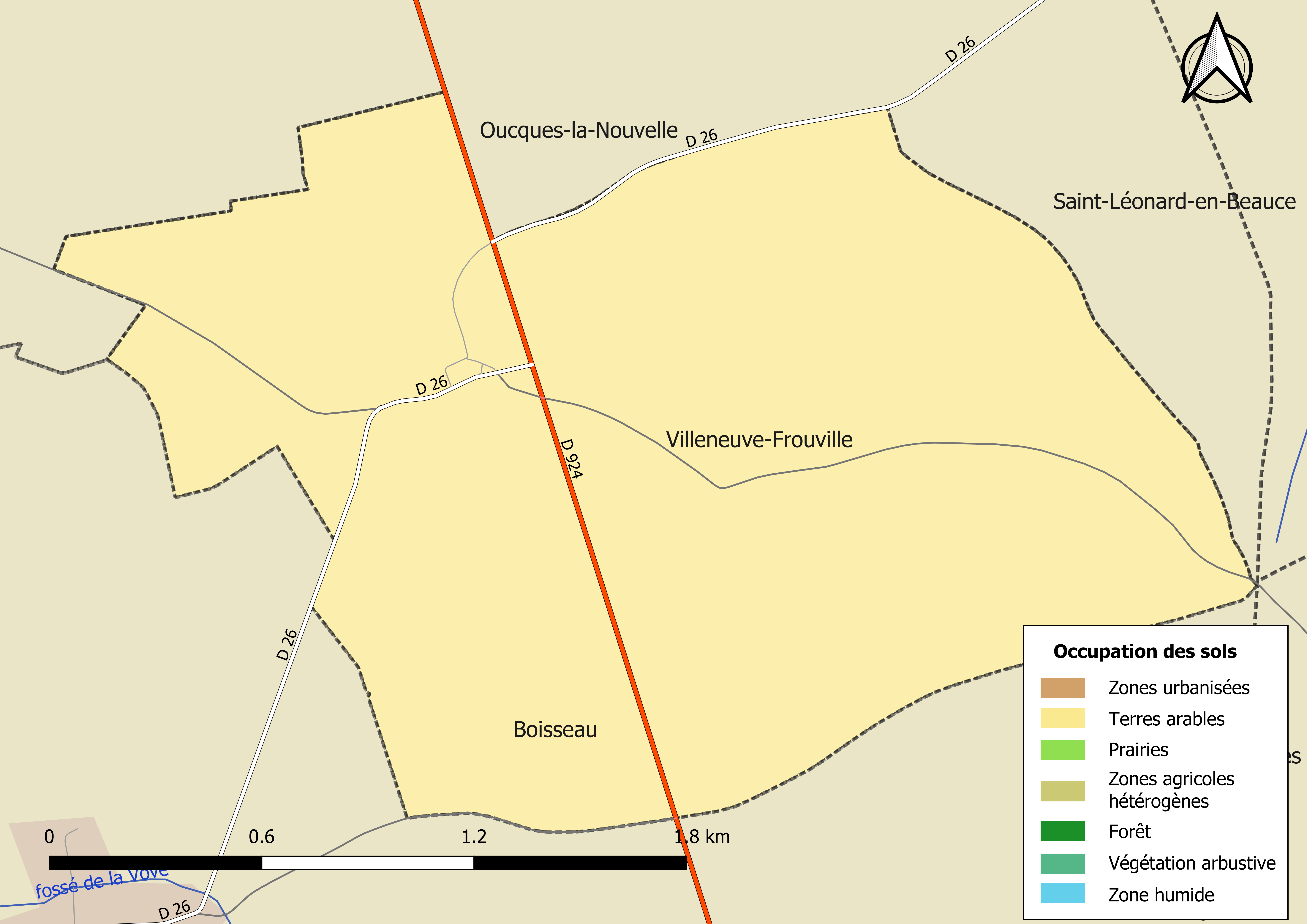 Carte des infrastructures et de l’occupation des sols en 2018 de la commune de Villeneuve-Frouville (France).